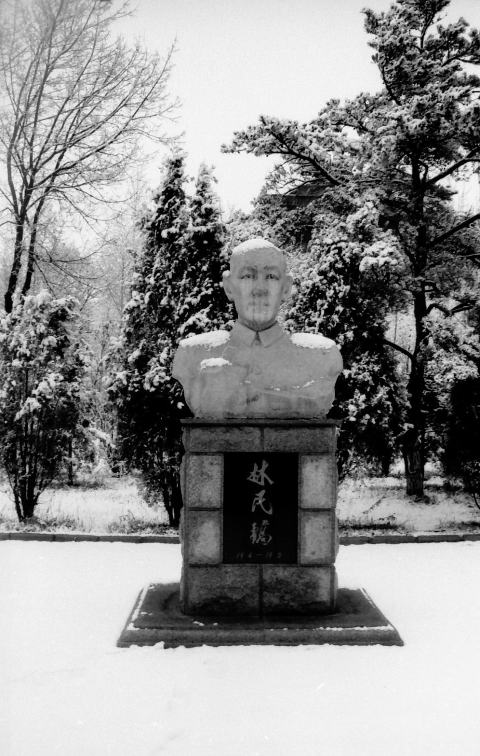 林民鎬延辺大学副校長胸像